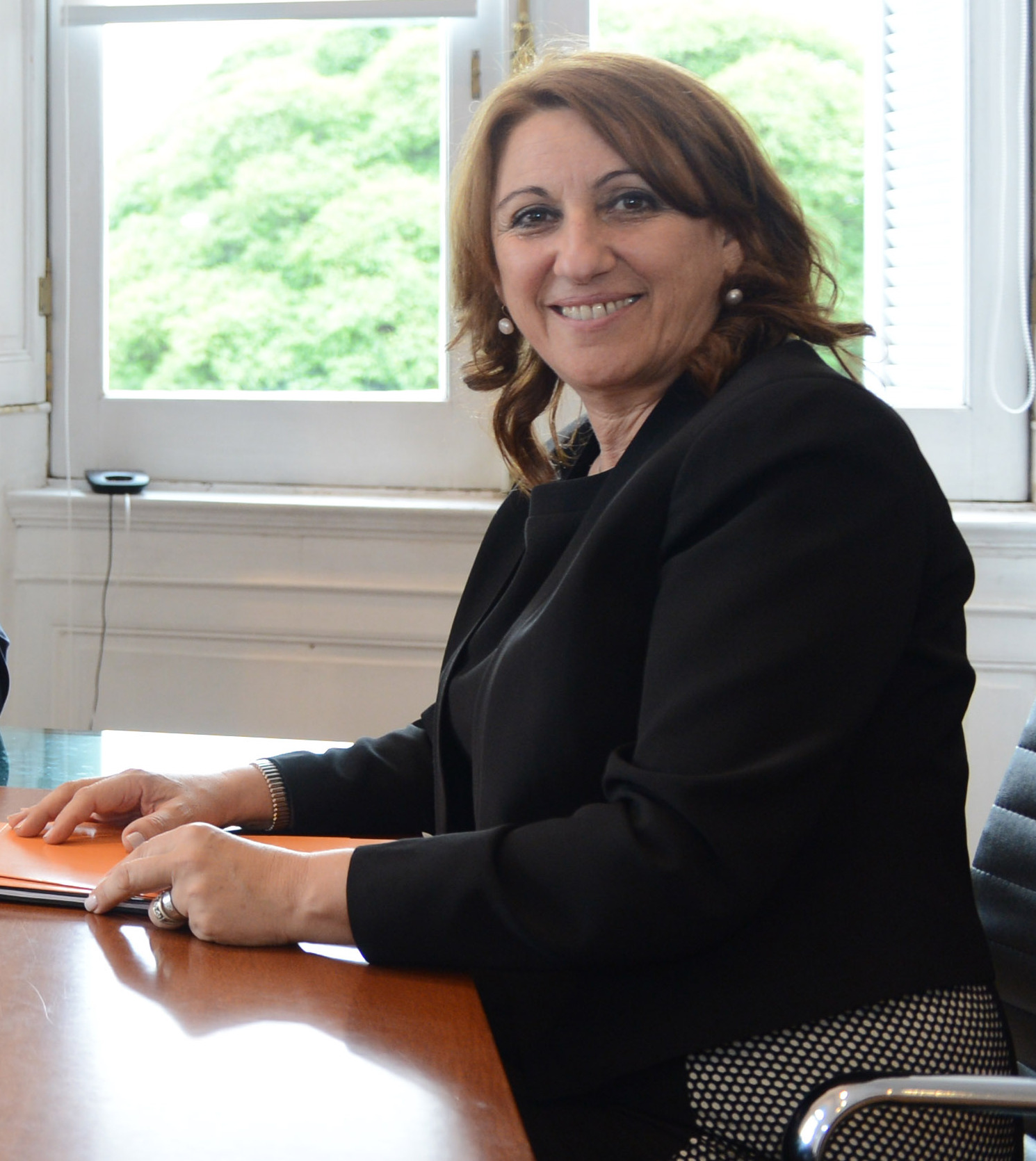 El jefe de Gabinete, Marcos Peña, y el ministro de Interior, Rogelio Frigerio, se reunieron hoy en Casa de Gobierno con la intendenta de Rosario, Mónica Fein, como parte de la mesa de trabajo de cooperación que la Nación lleva adelante con los diferentes municipios.